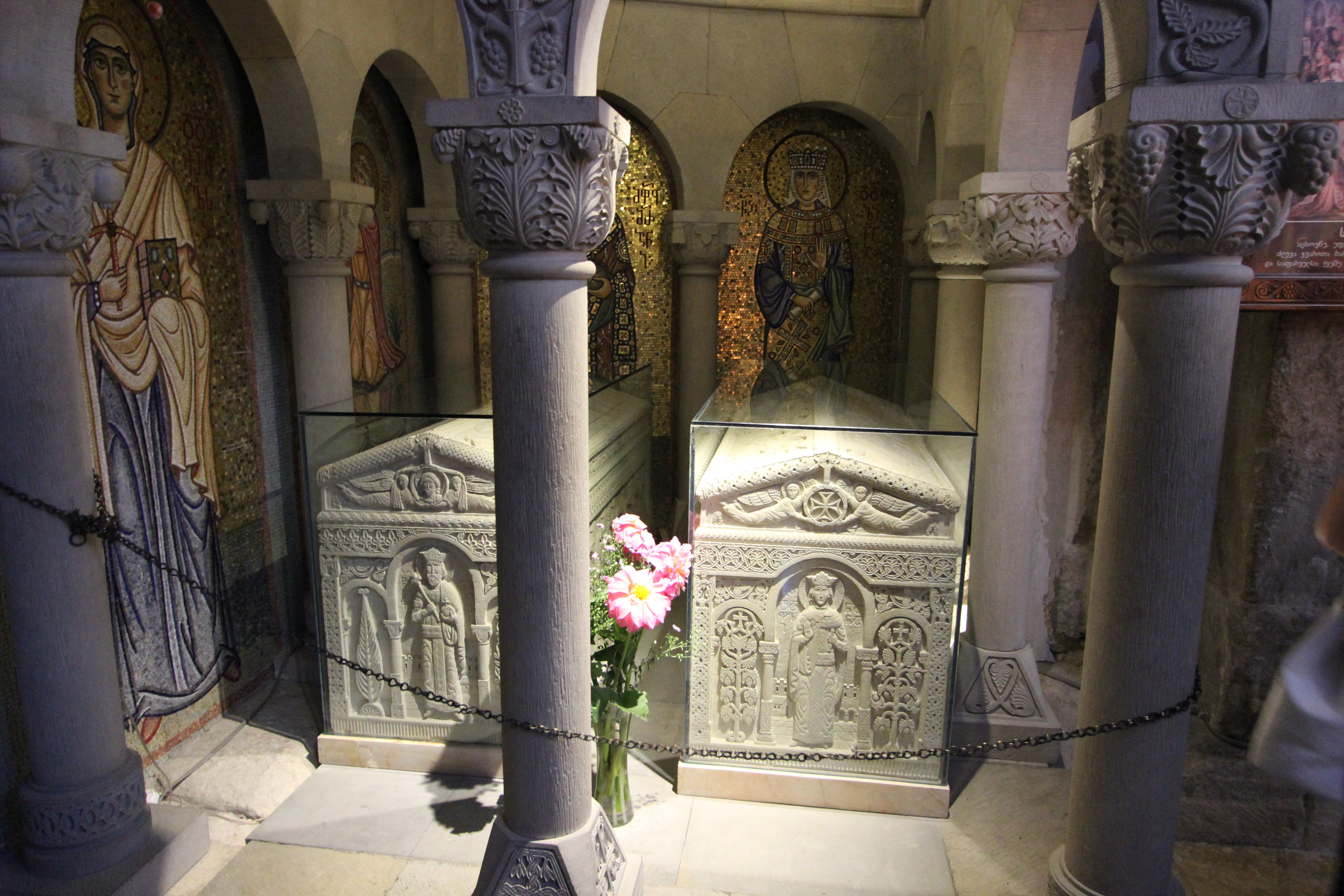 Mtskheta - Samtavro Monastery